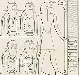 Iuntiu-seti (Nubier), Großer Karnaktempel, nördliche Außenwand, Darstellung des Sethos I.